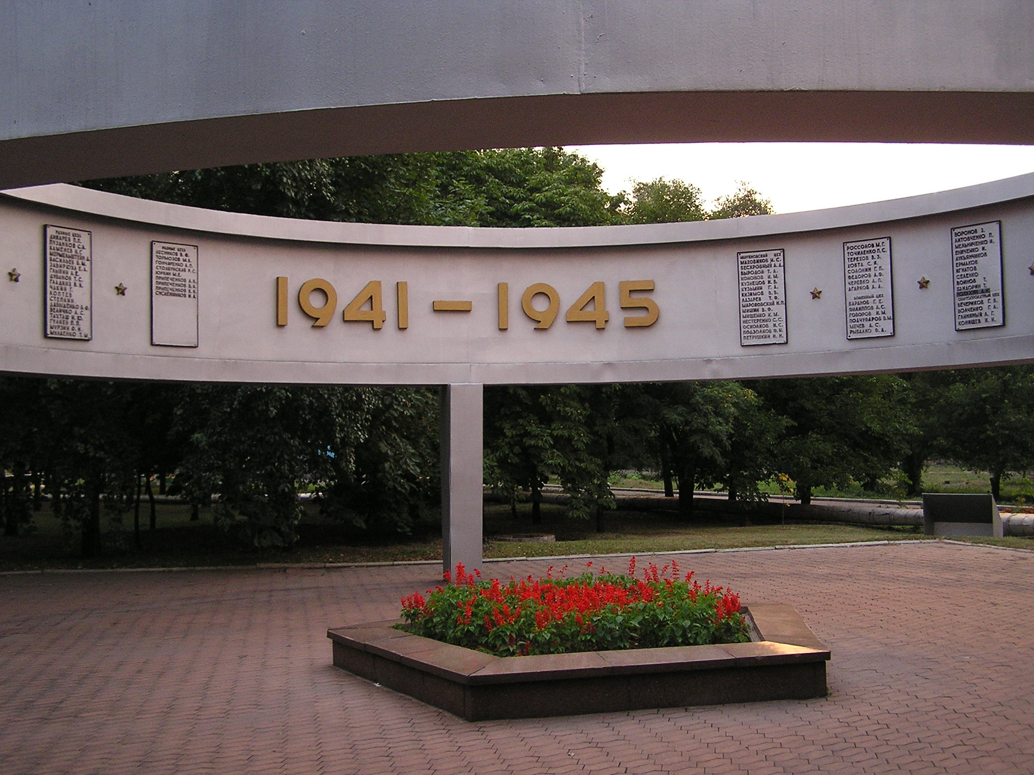 мемориал "Живые - бессмертным"